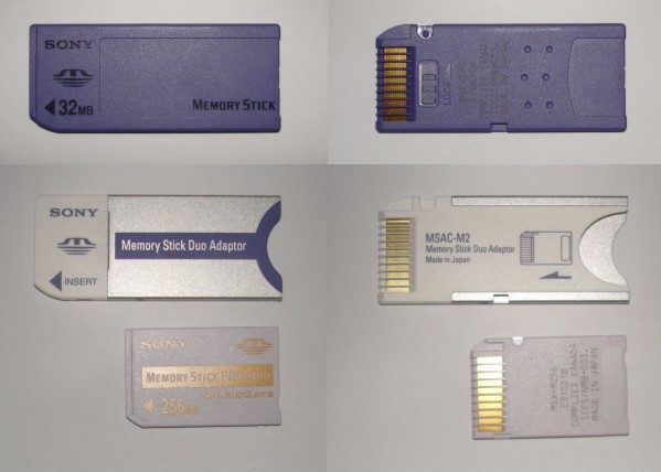 Memory Sticks